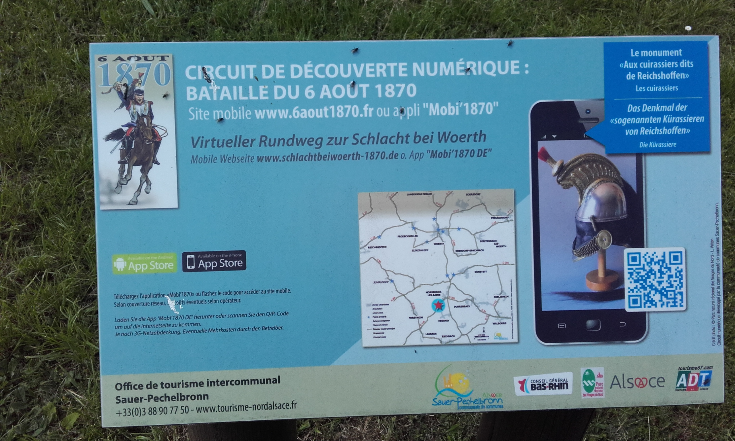 Bas-Rhin, Mosbronn-les-Bains, circuit découverte numérique : bataille du 6 août 1870.